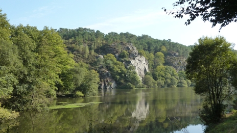 L'île-aux-pies